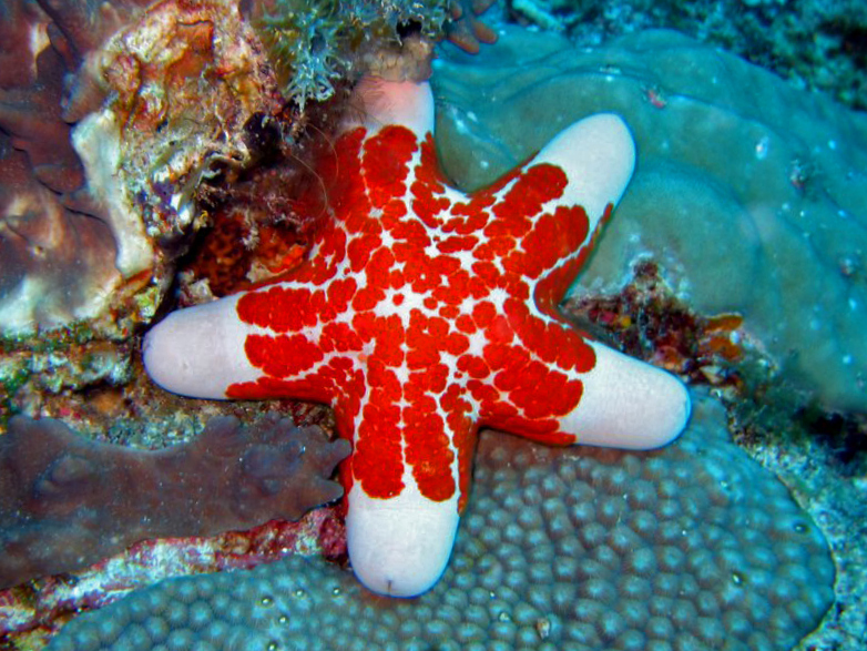 "Choriaster granulatus" in Madagascar